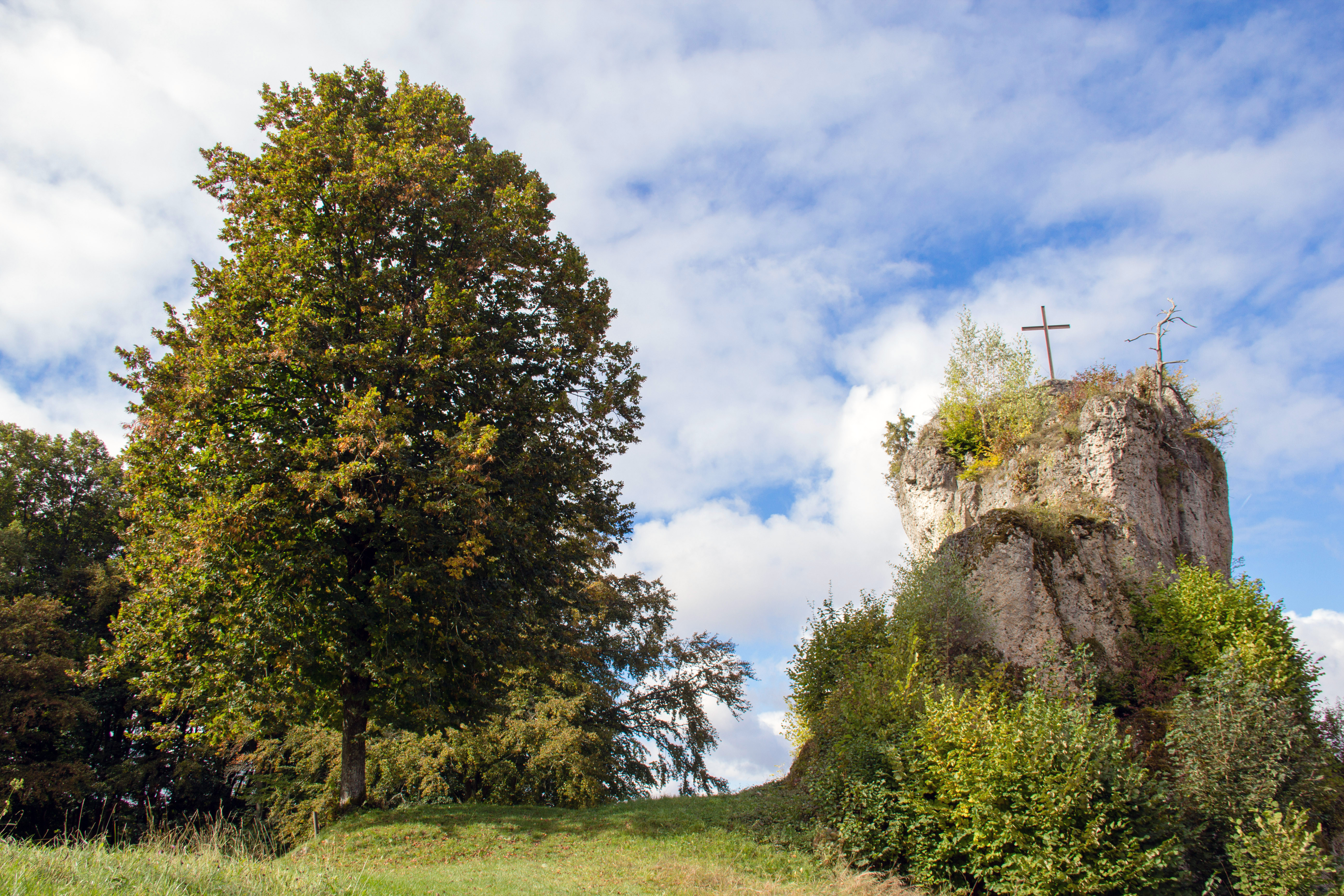 Bärnfelsen in Bärnfels, Geotop